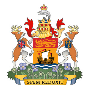 Stemma del New Brunswick